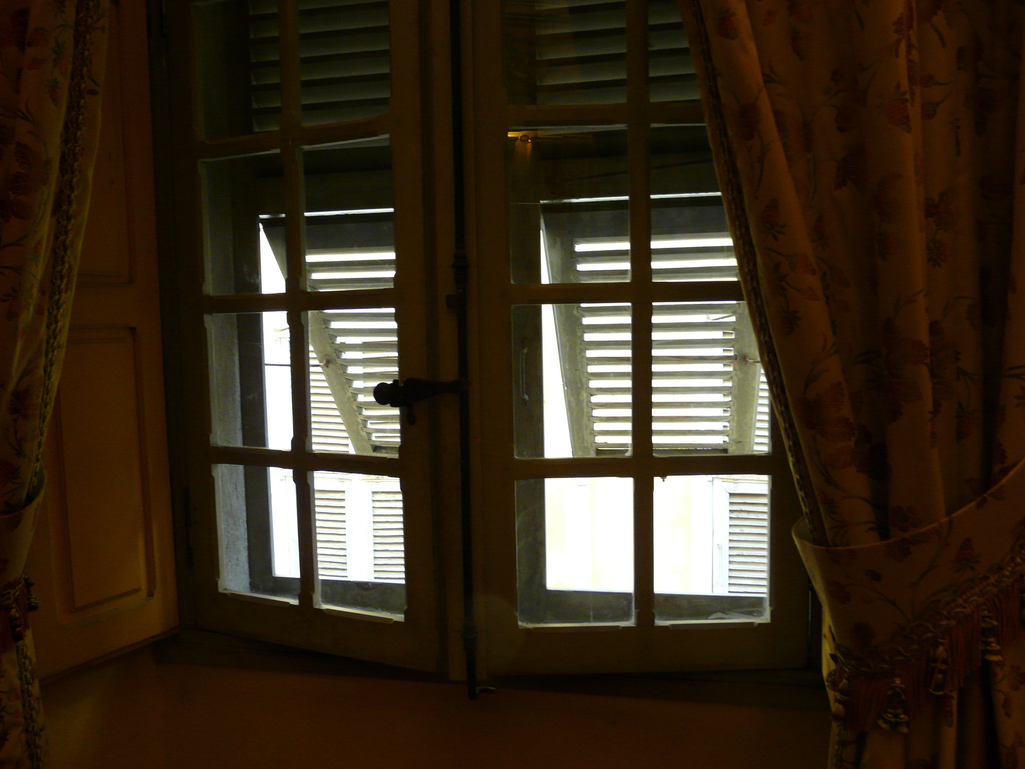 Volets "niçois" avec clapet de prise d'air